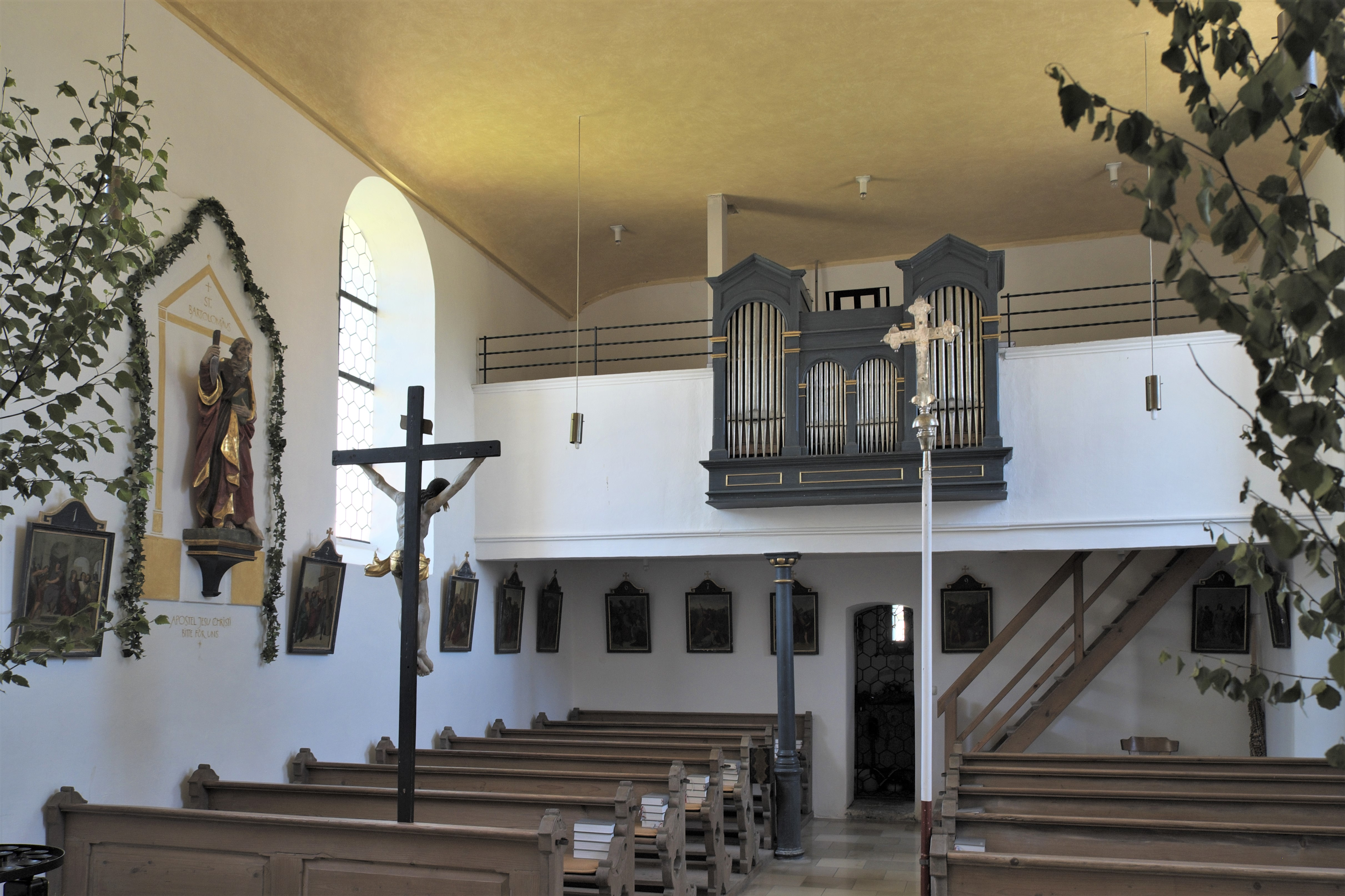 Katholische Filialkirche St. Bartholomäus in Maising (Pöcking) im Landkreis Starnberg (Bayern, Deutschland), Innenraum